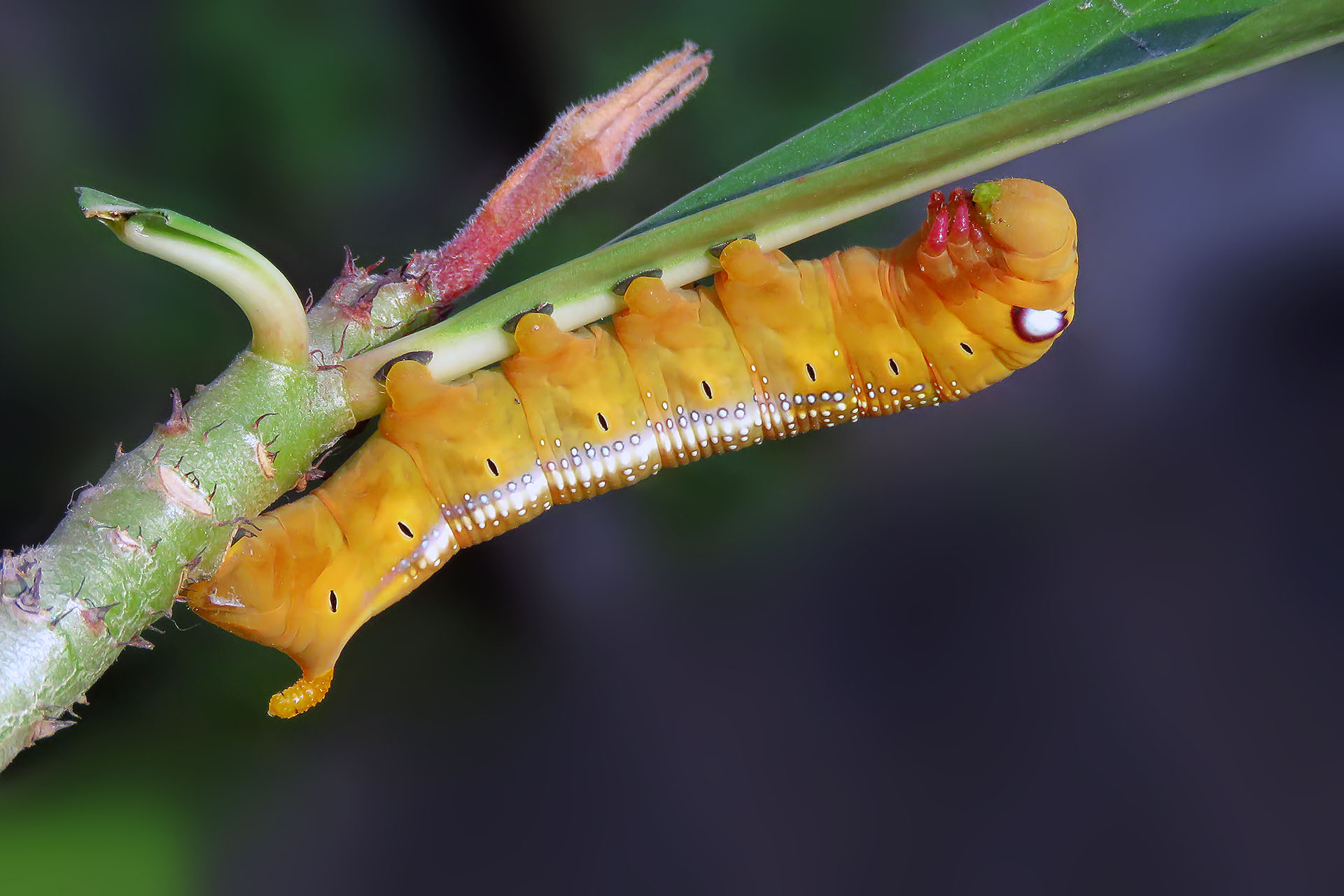 Daphnis nerii